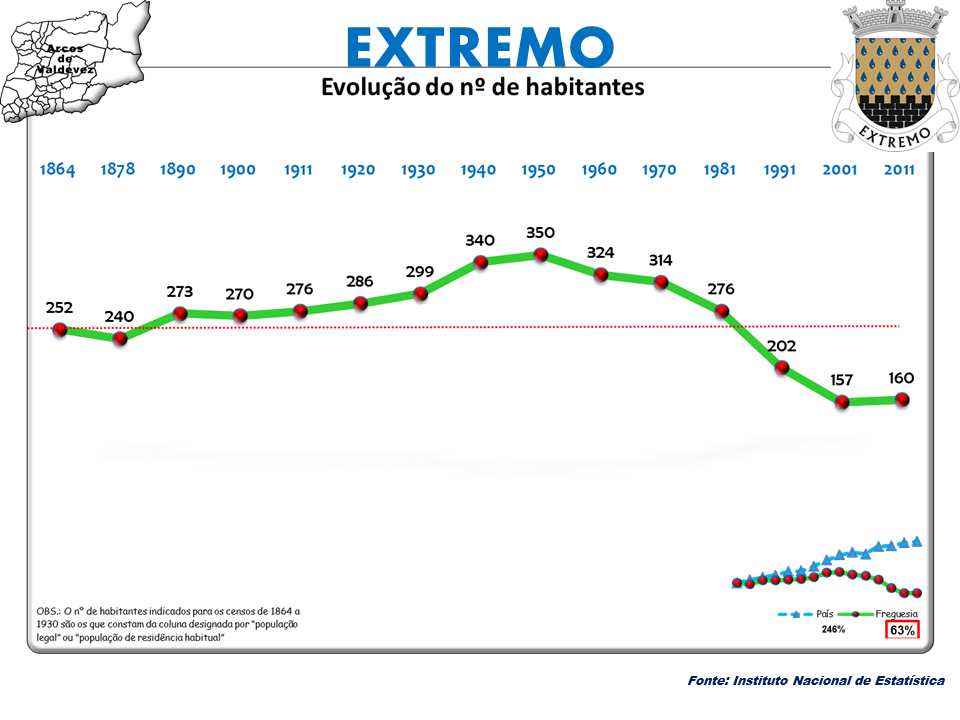 Censos 1864/2011